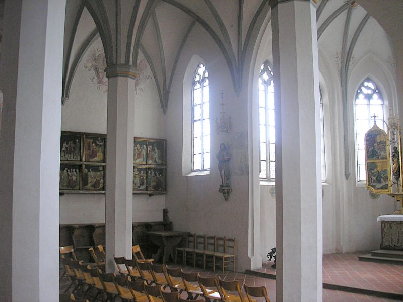 St. Blasius Kaufbeuren (Bayerisch-Schwaben). Innenansicht / St. Blasius Kaufbeuren (Bavaria, Germany). The nave. Eigene Aufnahme, Aug. 2006 / Own photo, Aug. 2006